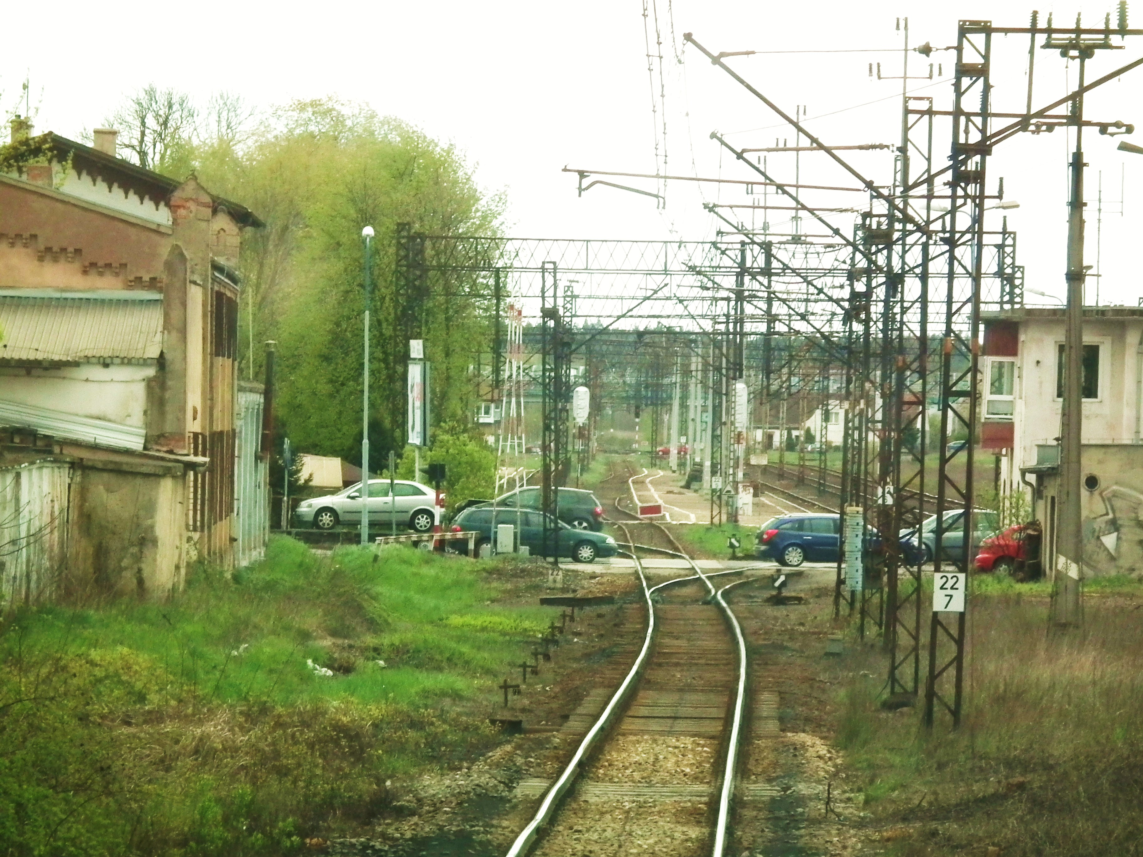 Stacja Lubin Górniczy.